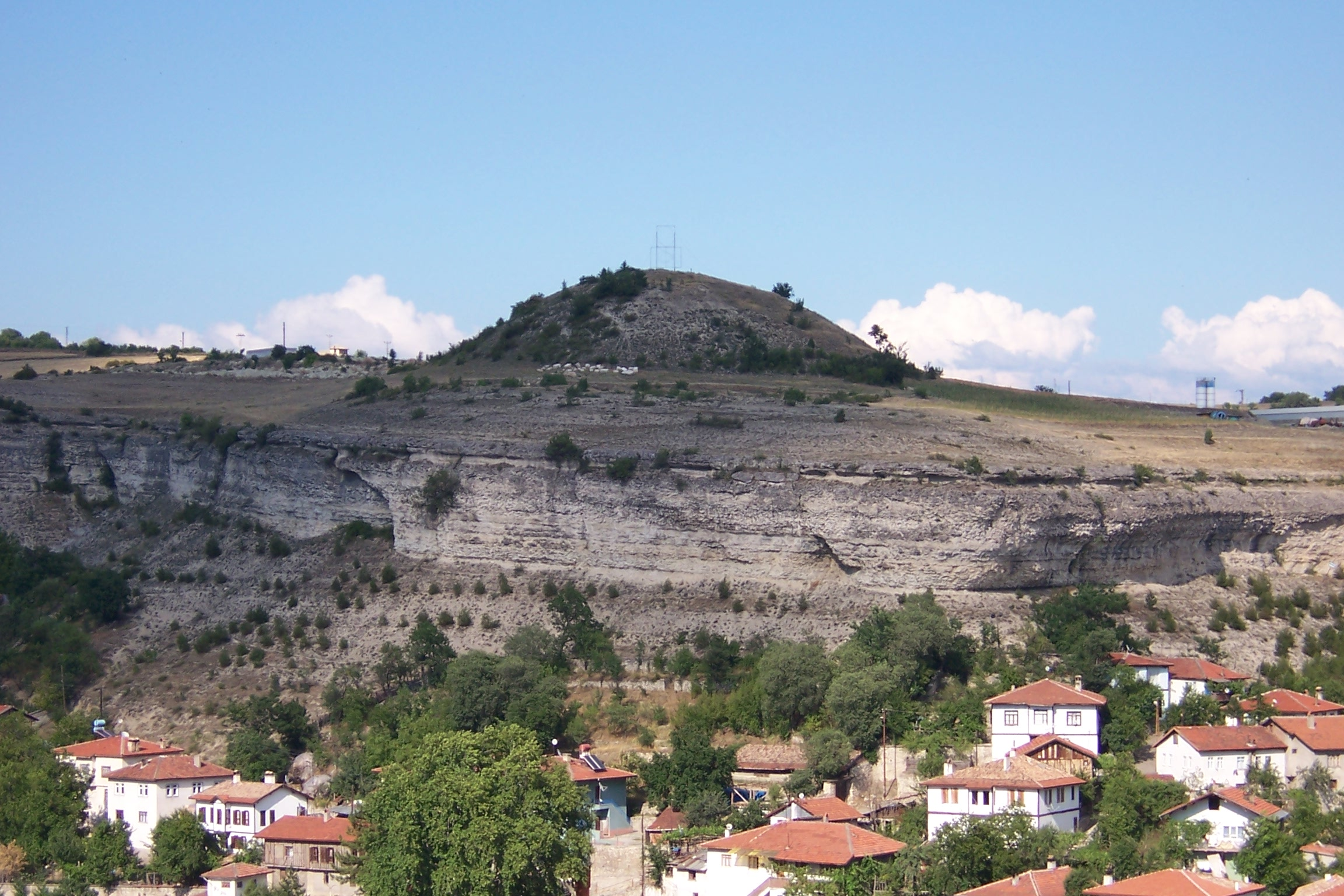 A Tumulus in Safranbolu, Karabük, Turkey